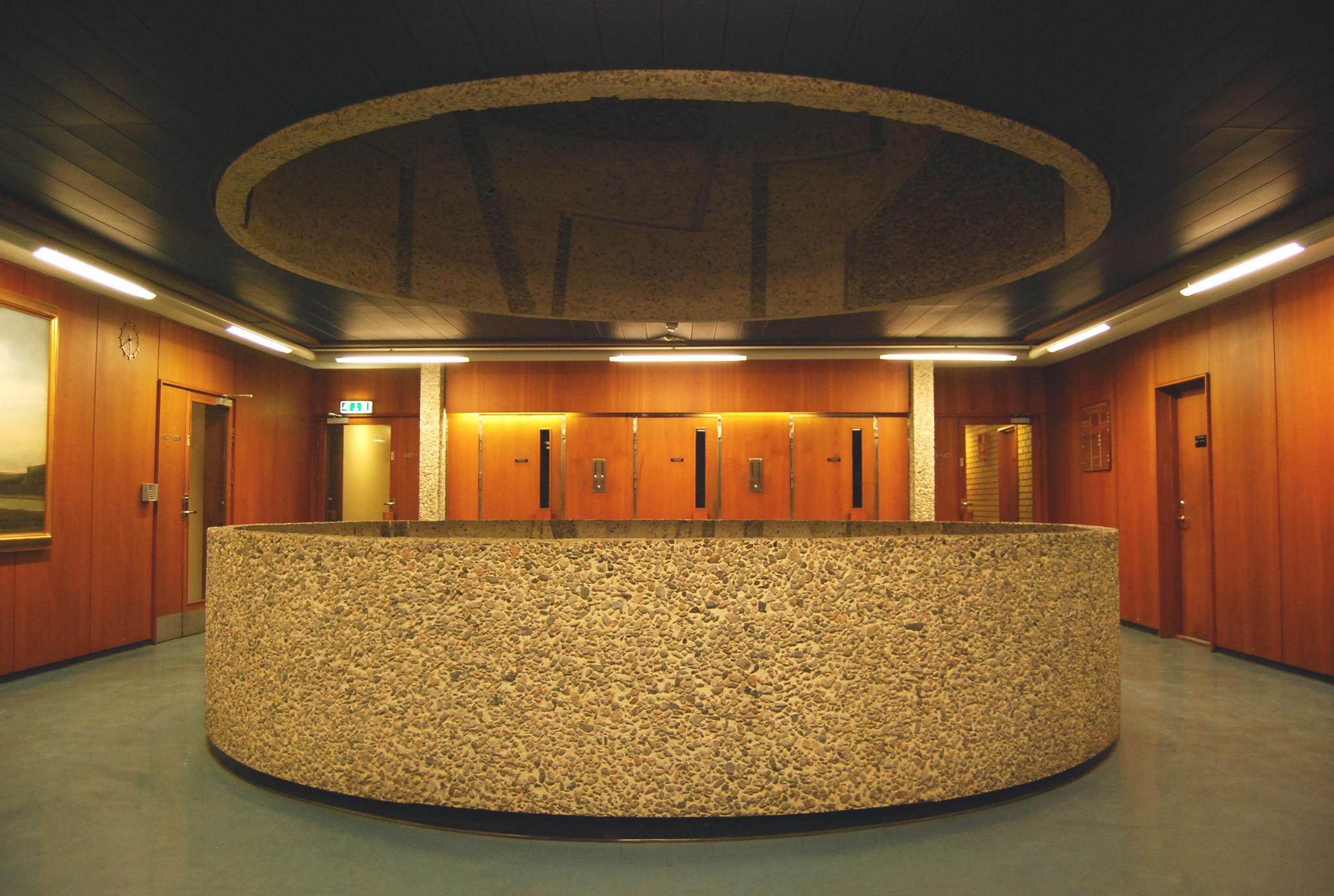 Rotunden sett fra en av etasjene i NVE-huset. Her ser man tydelig den sandblåste naturbetongen som kunstneren Odd Tandberg brukte i sin utsmykking av huset. Rotunden er fredet og det er også teakveggene vi ser. Dato: 23.02.2009